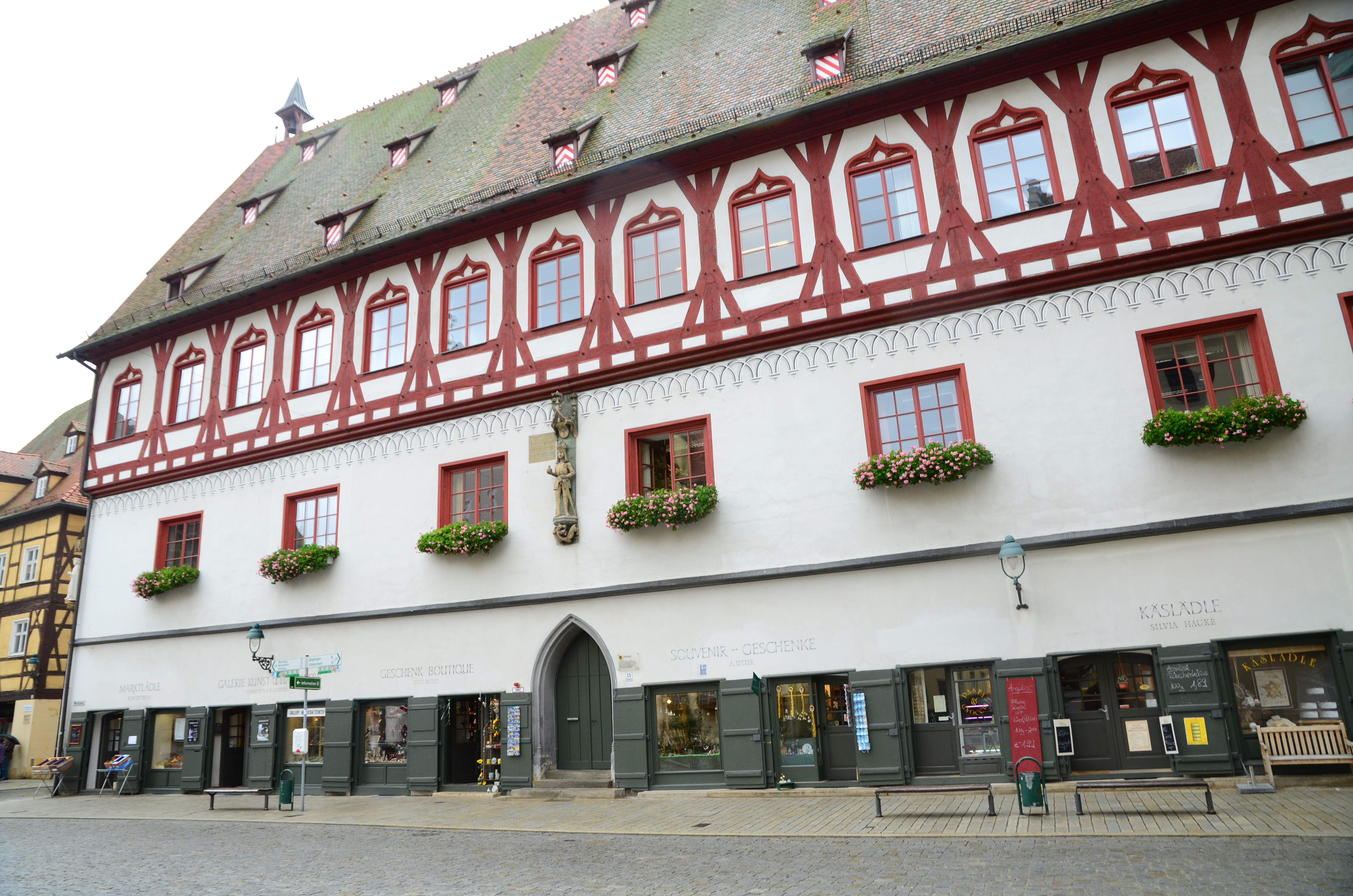 Nördlingen, Marktplatz 15, Brot- und Tanzhaus